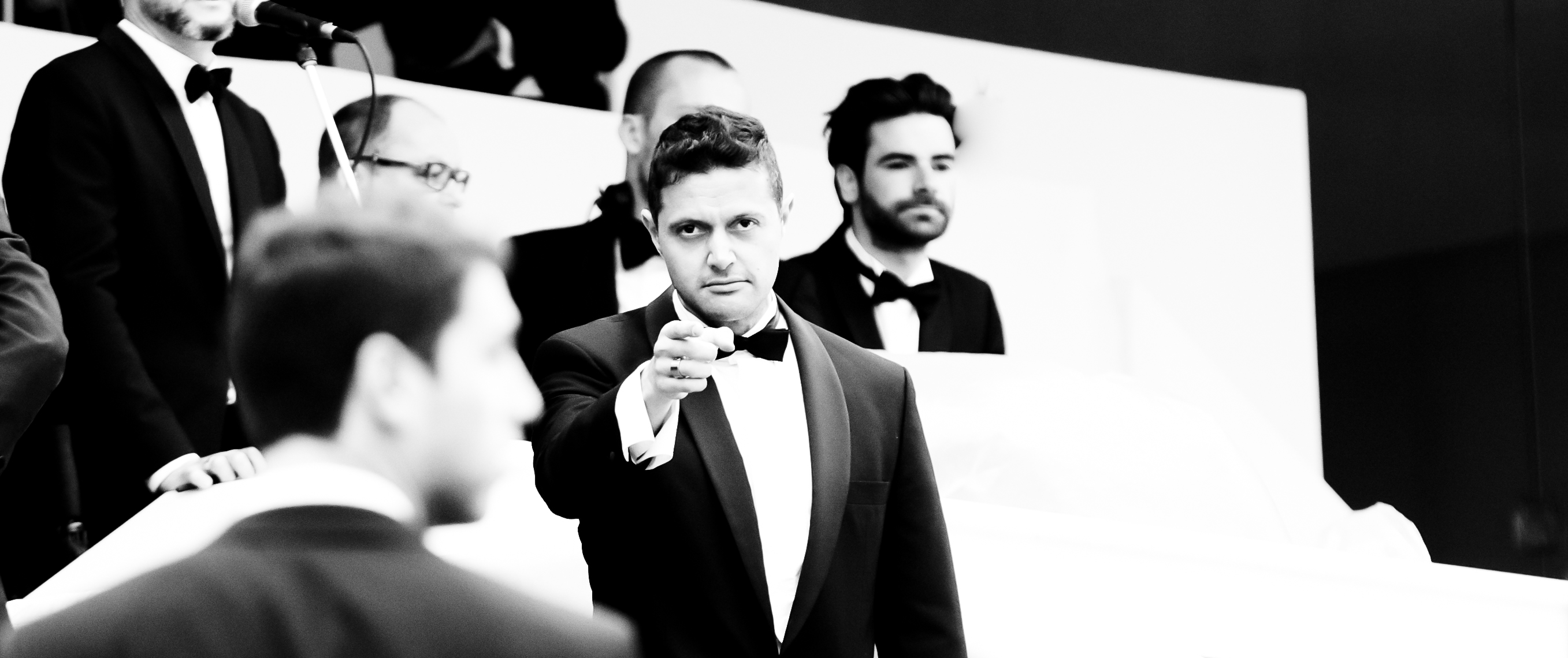 Foto de Amin Yoma